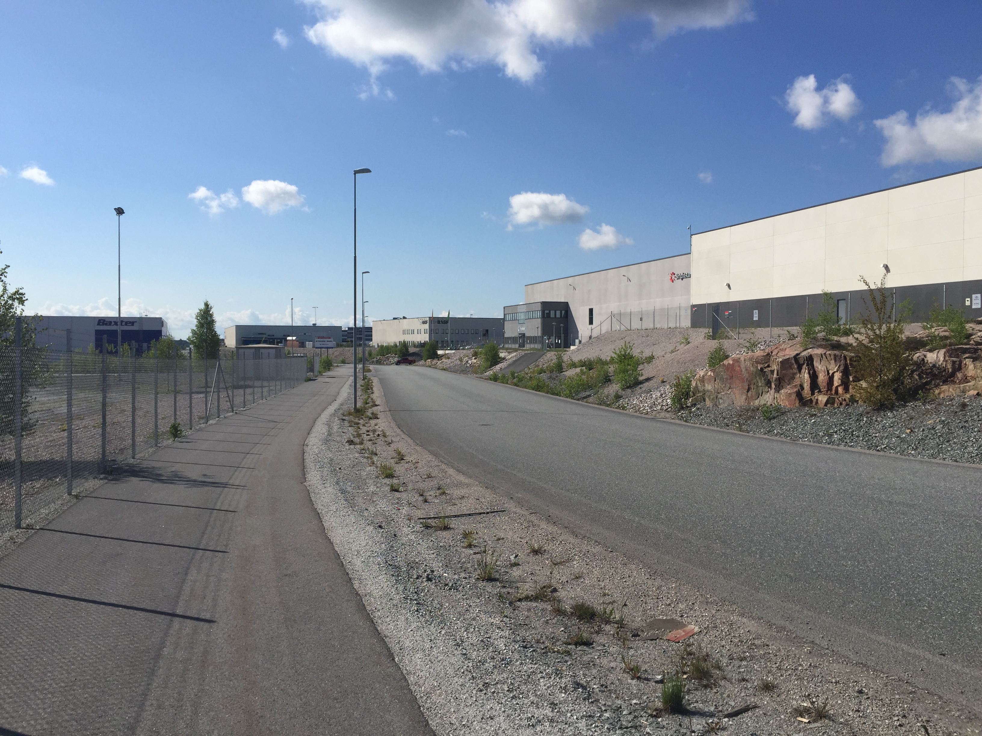 Metallvägen, Rosersbergs industriområde